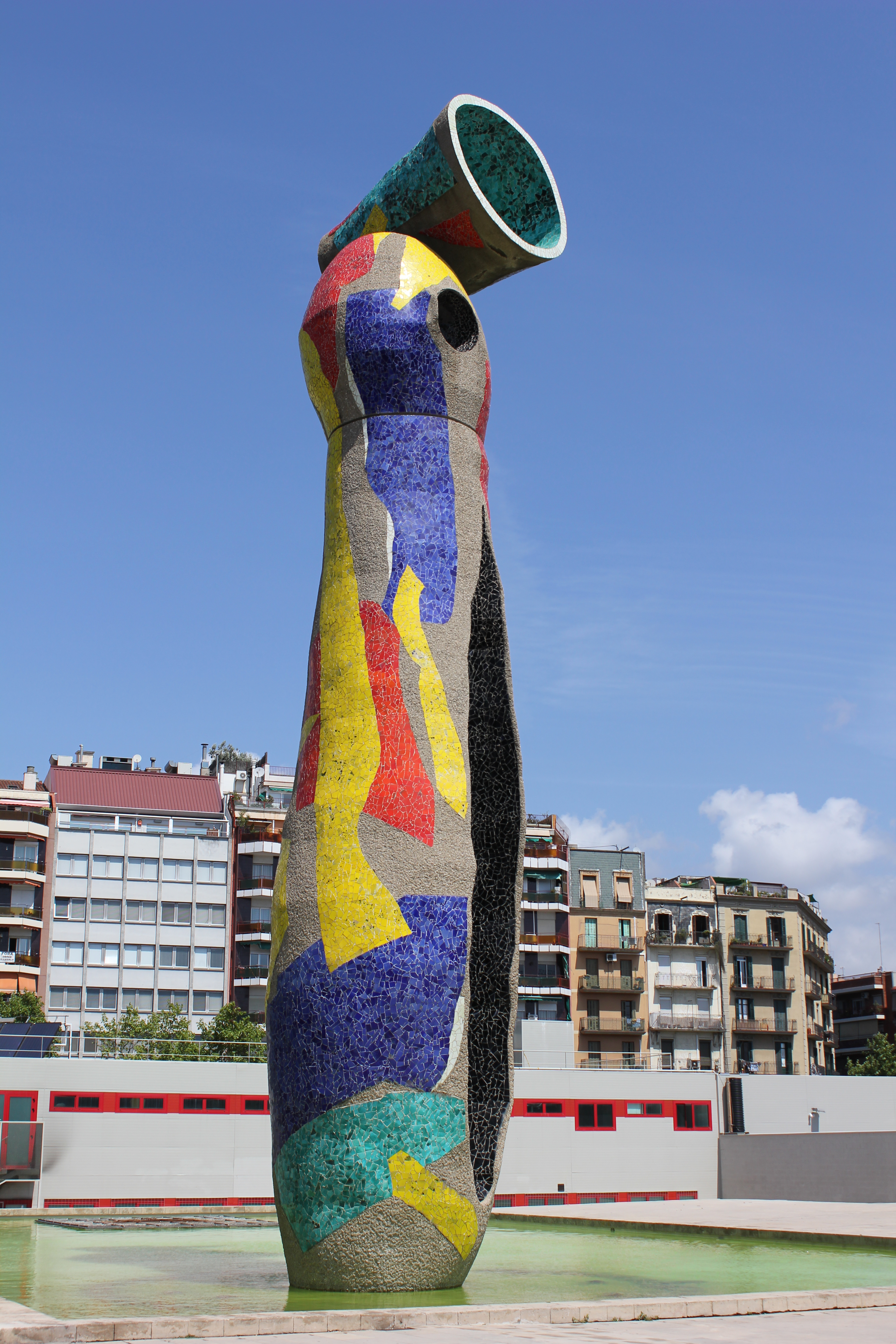 La femme et l'oiseau de Miro